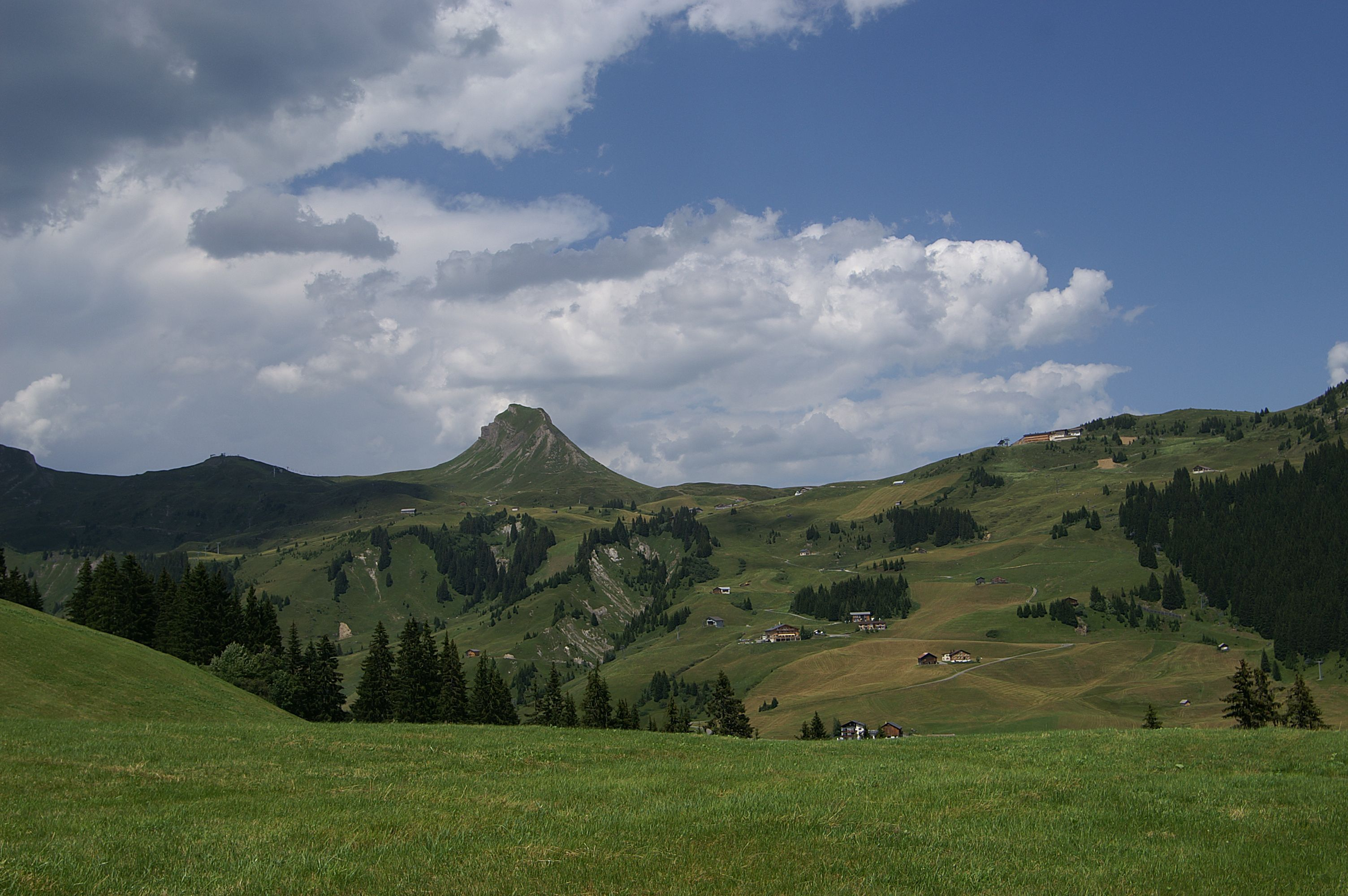 Damülser Mittagsspitze 2095m Blick von der Damülser Kirche.